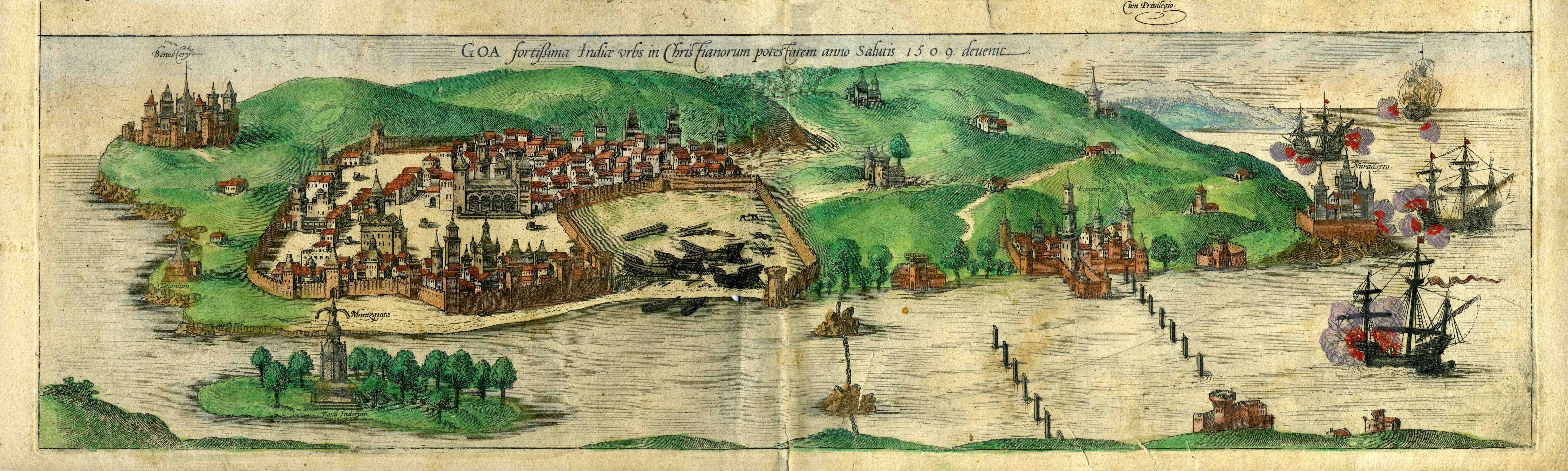 Ville de Goa de l'Atlas de Braun et Hogenberg